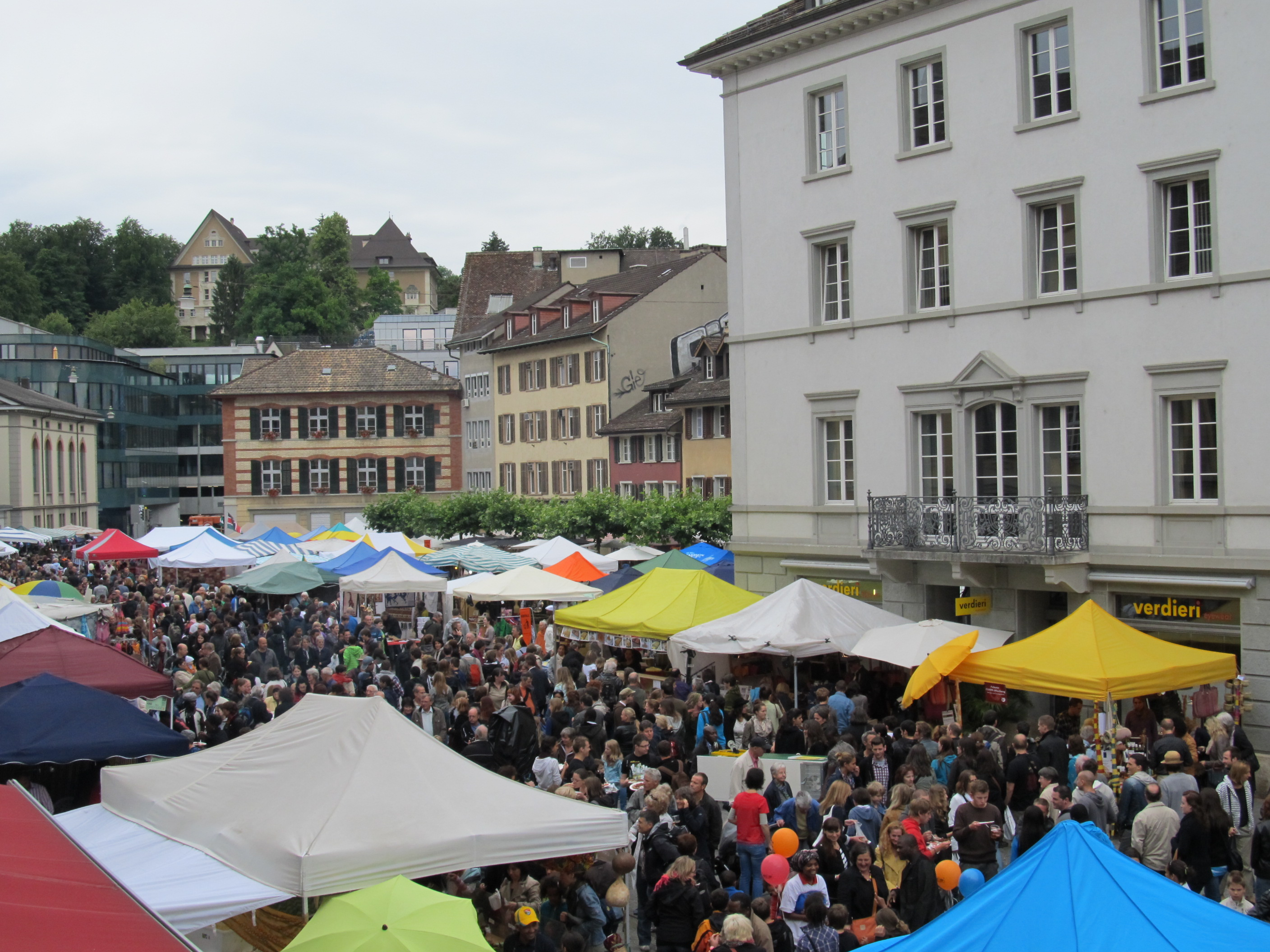 Zurich-Winterthur Afro-Pfingsten Festival 07